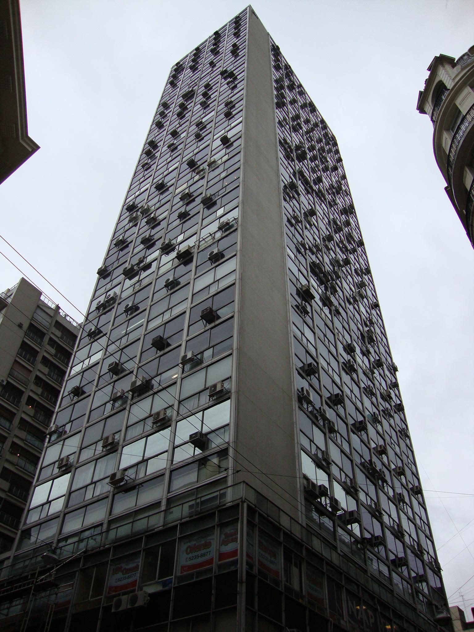 Torre de la Galería Florida. Esquina de la peatonal Florida y la calle Paraguay.